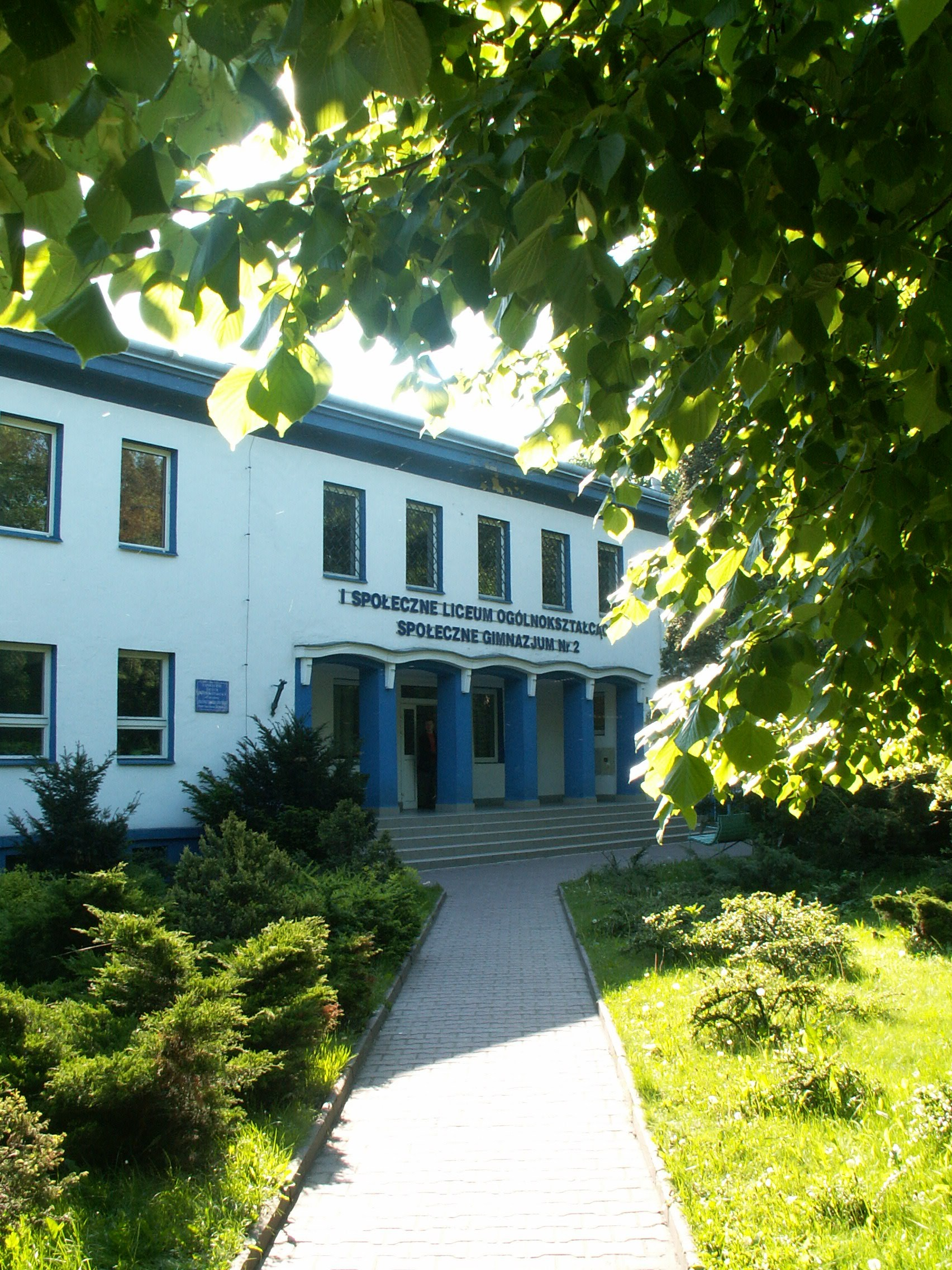 Częstochowa-I SLO im Herberta. Autor: Amadeusz Szklarz-Habrowski. Data: 29 maja 2006 Fotografia zastrzeżeniem podania autora w przypadku użycia zdjęcia do innych celów